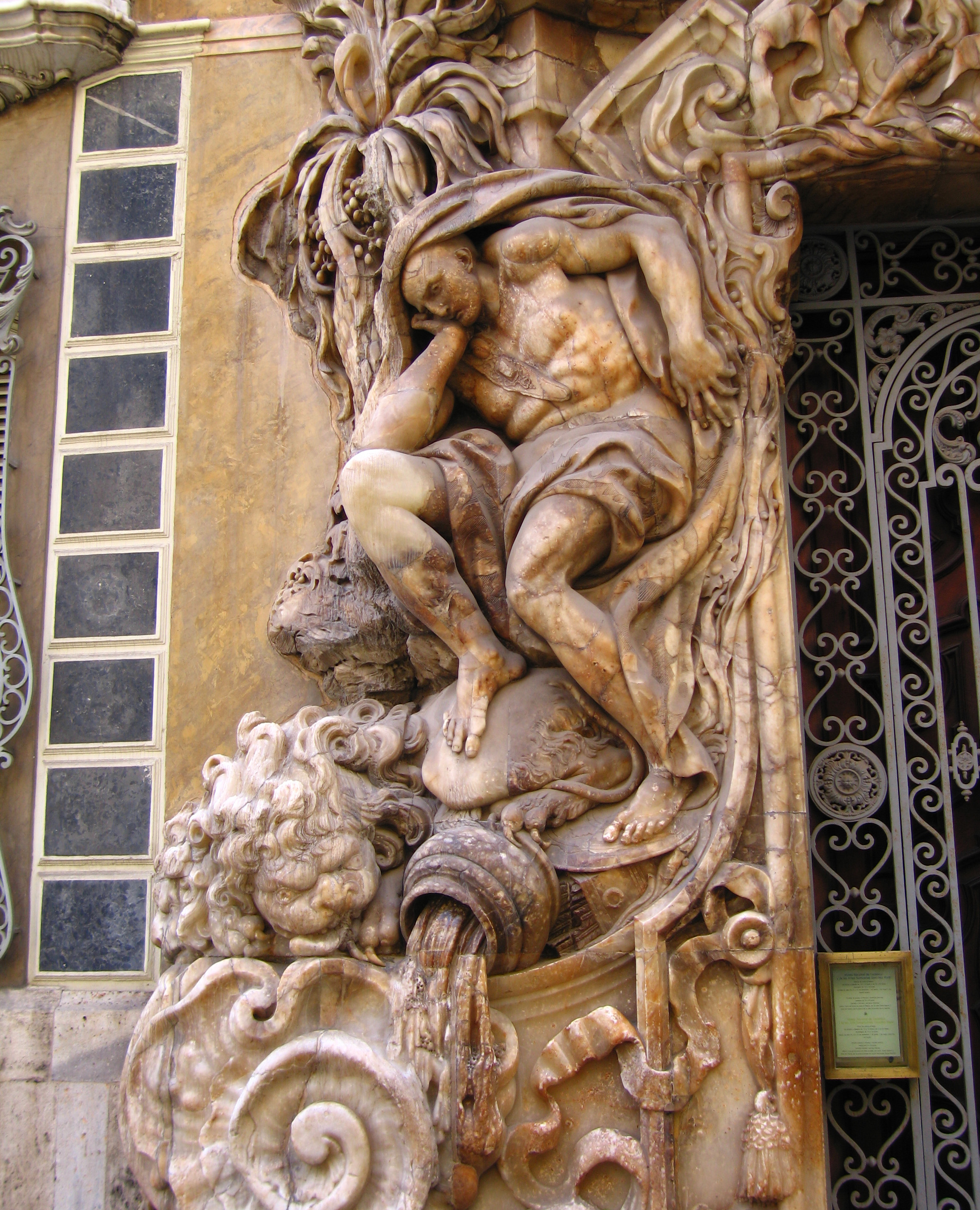 Palau del Marqués de Dosaigües